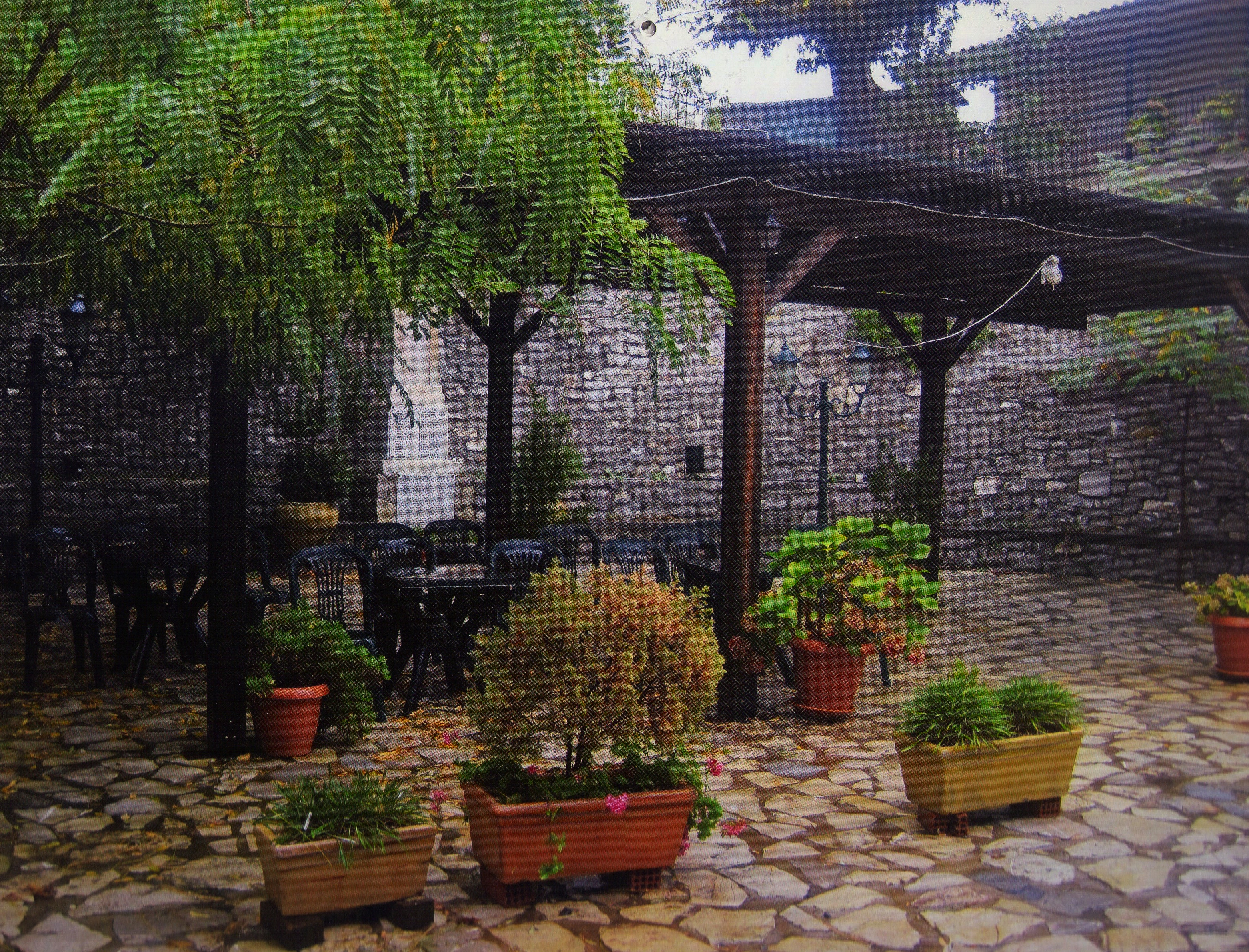 Ίσαρης, η πλατεία του ηρώου